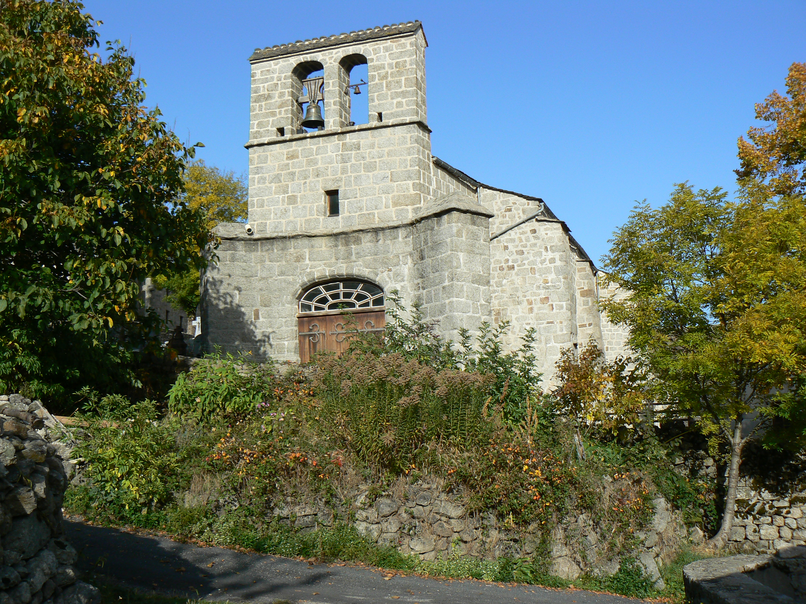 Eglise de Fraissinet-de-Lozère en Lozère (France)